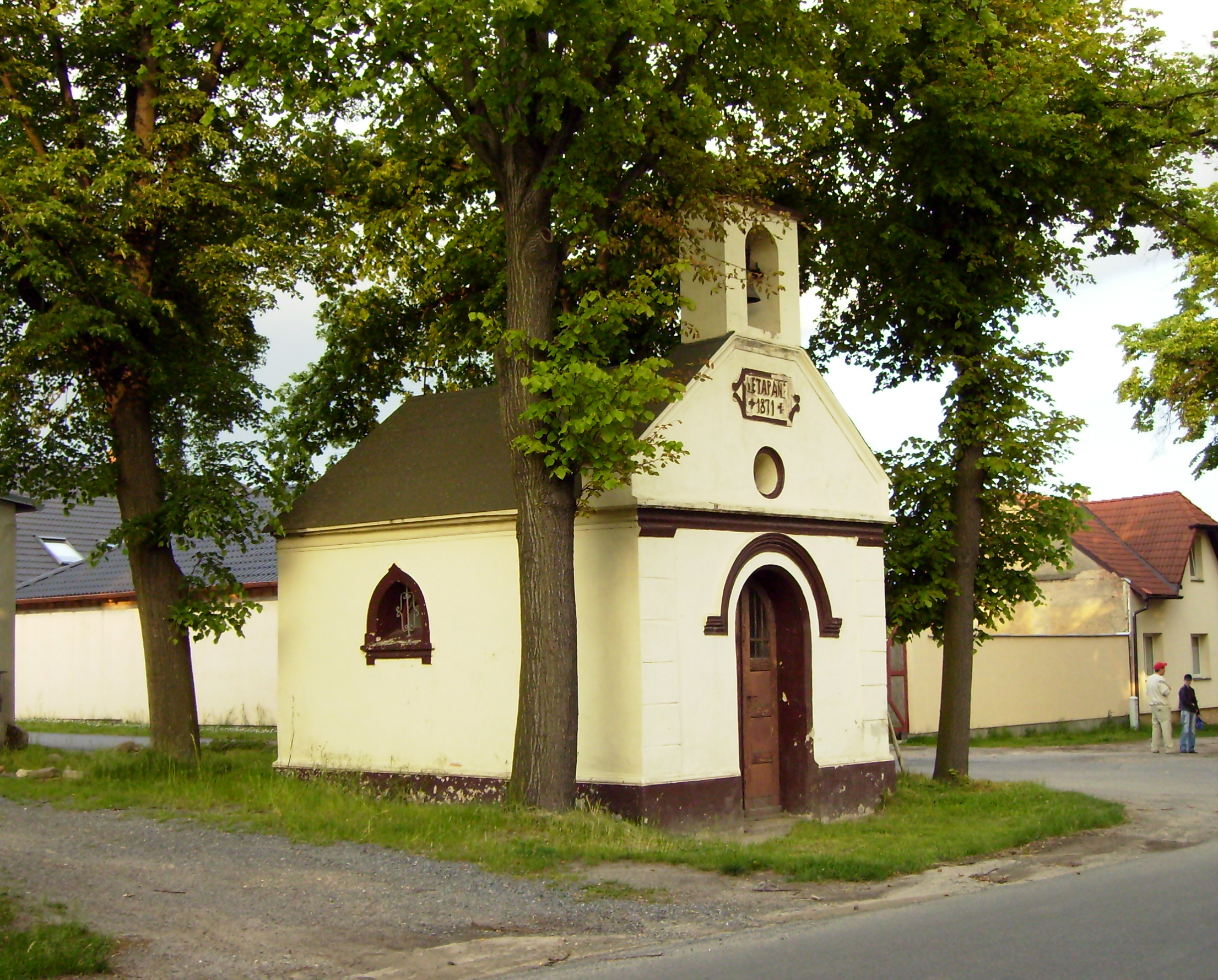 Kaplička v Nových Jirnech.